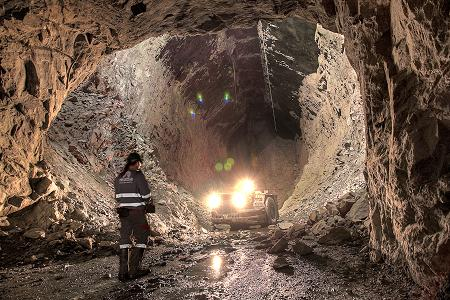 Interior de Mina de Aguas Teñidas, Matsa